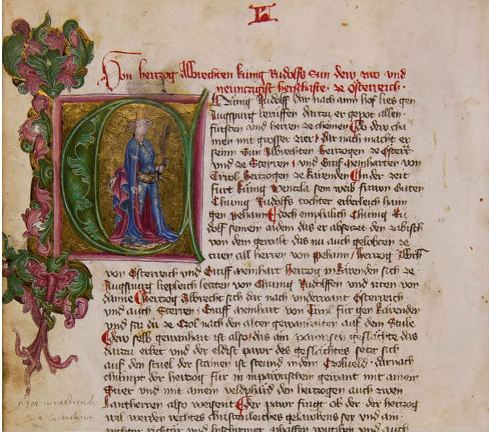 Chronik der 95 Herrschafen, Innsbruck, Universitäts- und Landesbibliothek Tirol, Cod. 255, fol. 65v, König Rudolf I. von Habsburg (König Albrecht I. von Habsburg?).